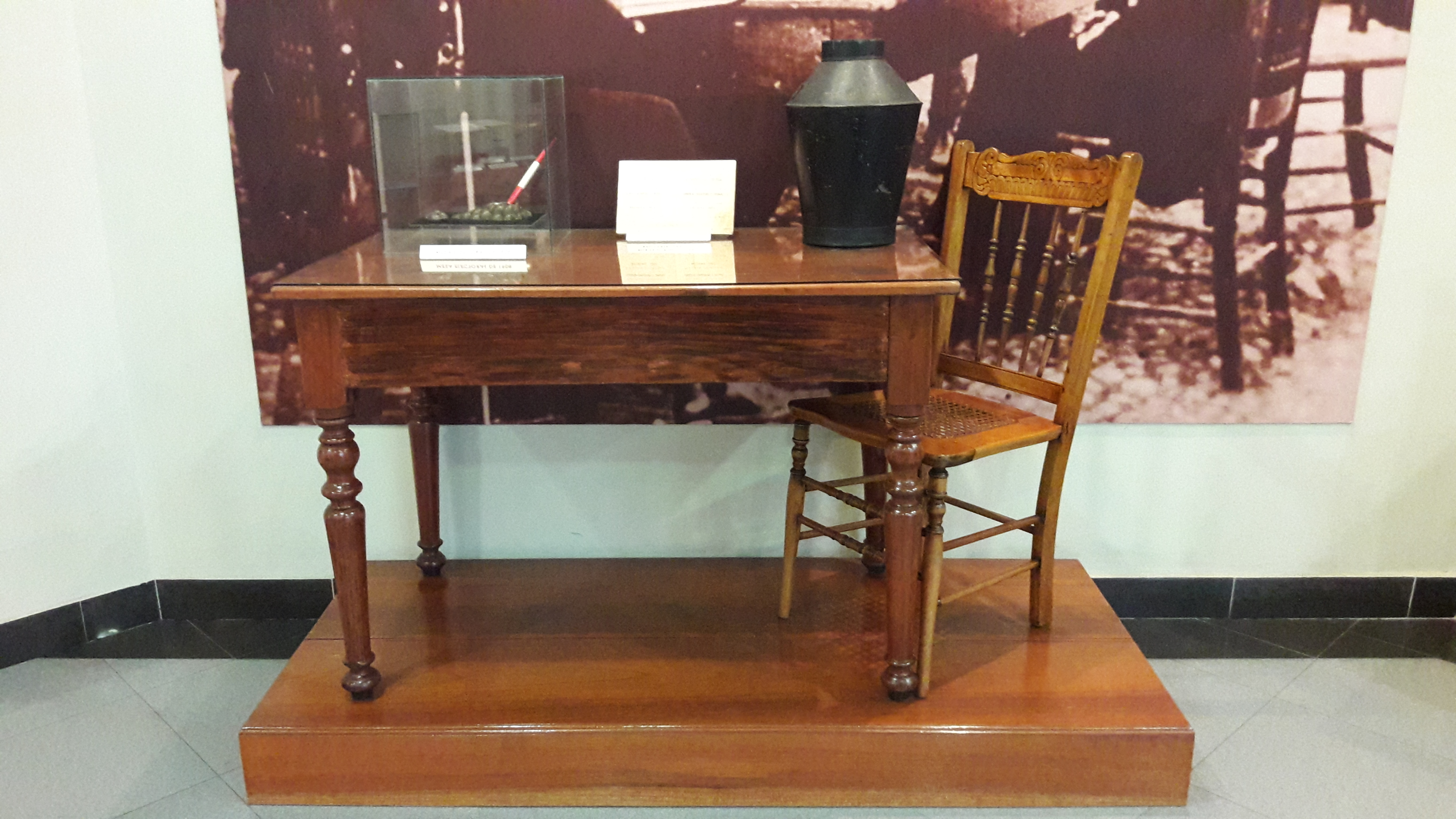 Mesa Directa 1904